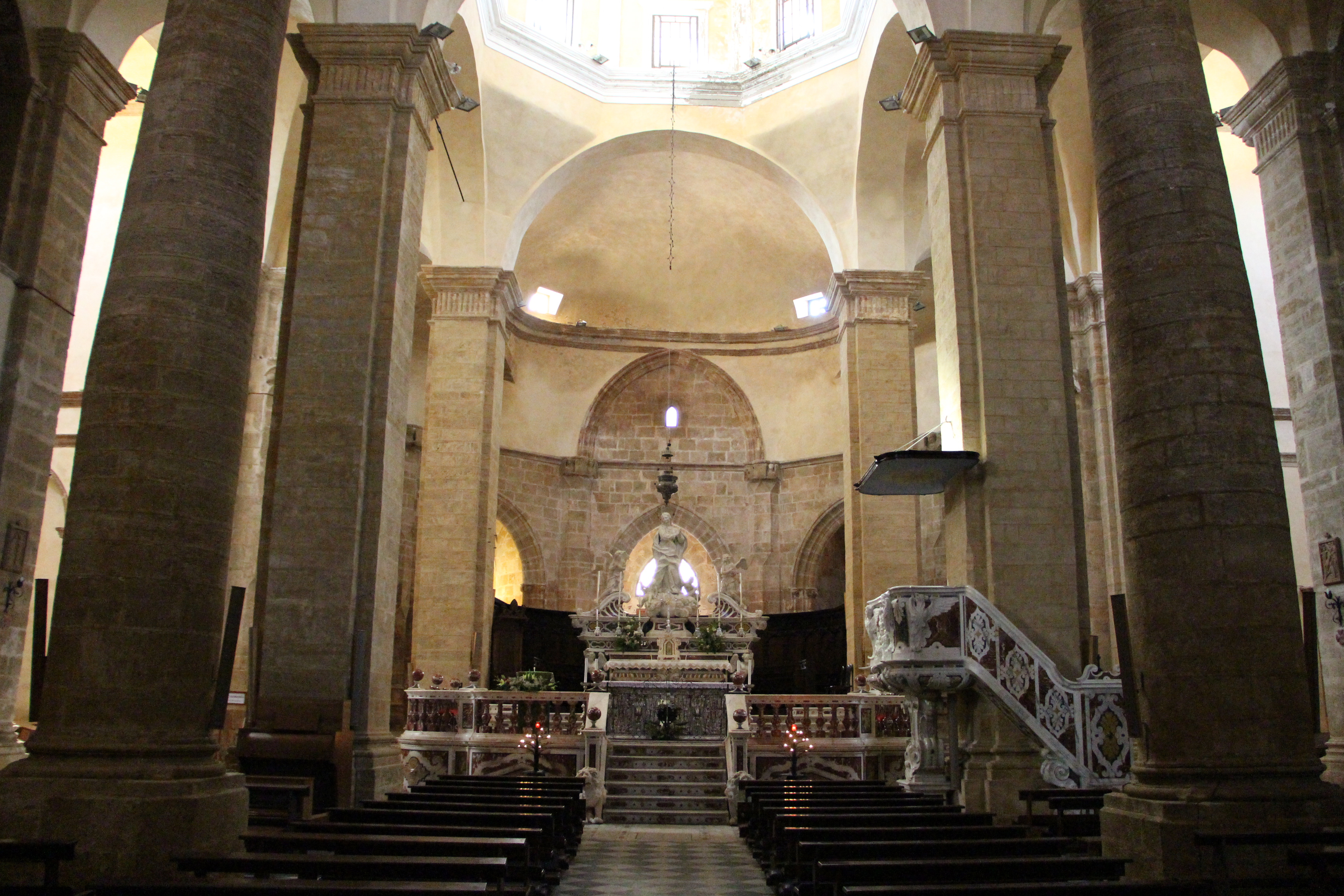 chiese di Alghero, Italia